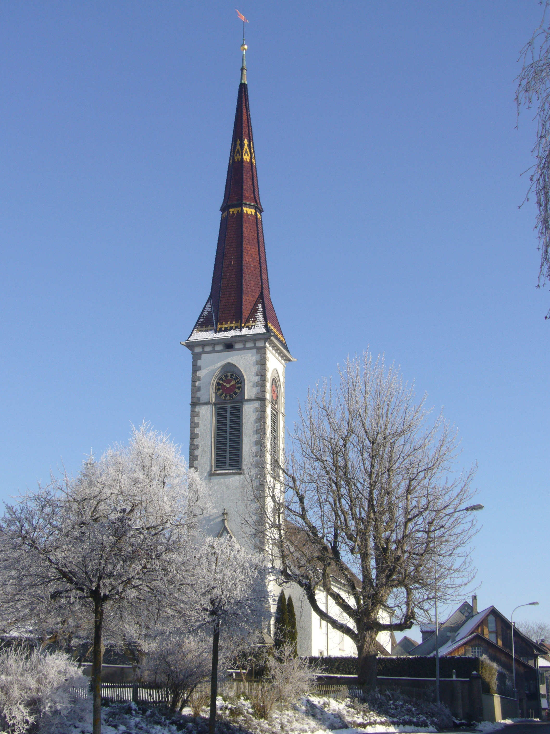 Kirche und Wohnhäuser an der Hauptstraße zu Stettfurt.